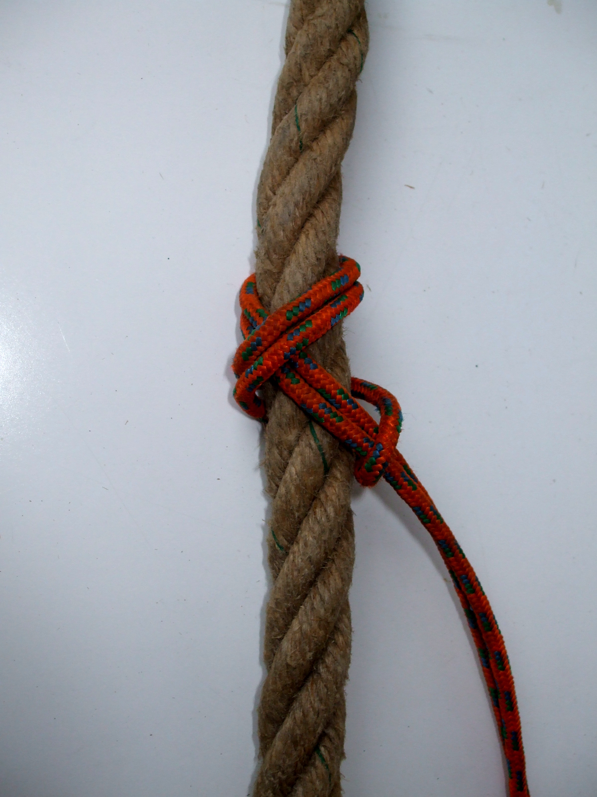 Kreuzklemmknoten Einfach